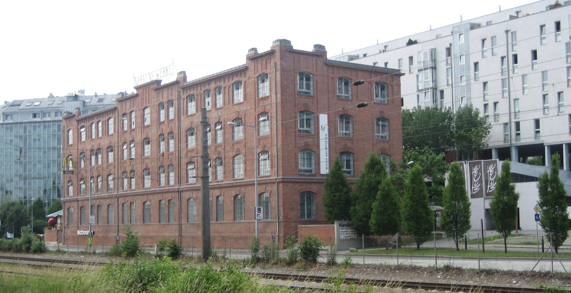 das Haus Handelskai 130 in der Leopoldstadt, in Wien